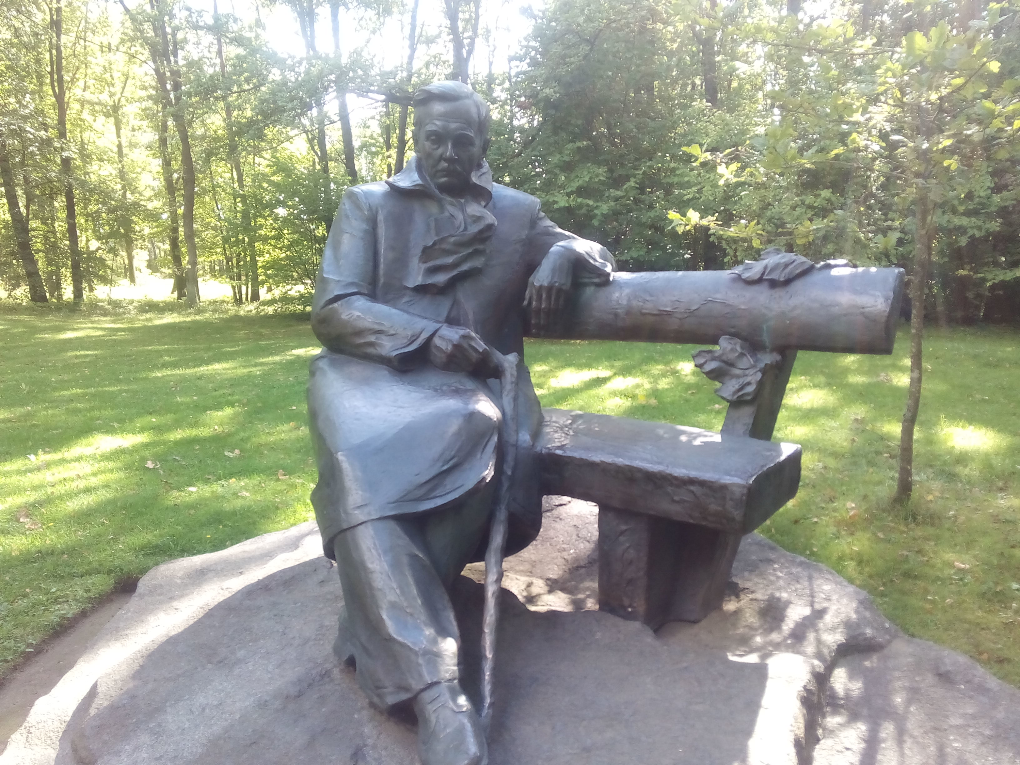 Янка Купала в деревне Левки